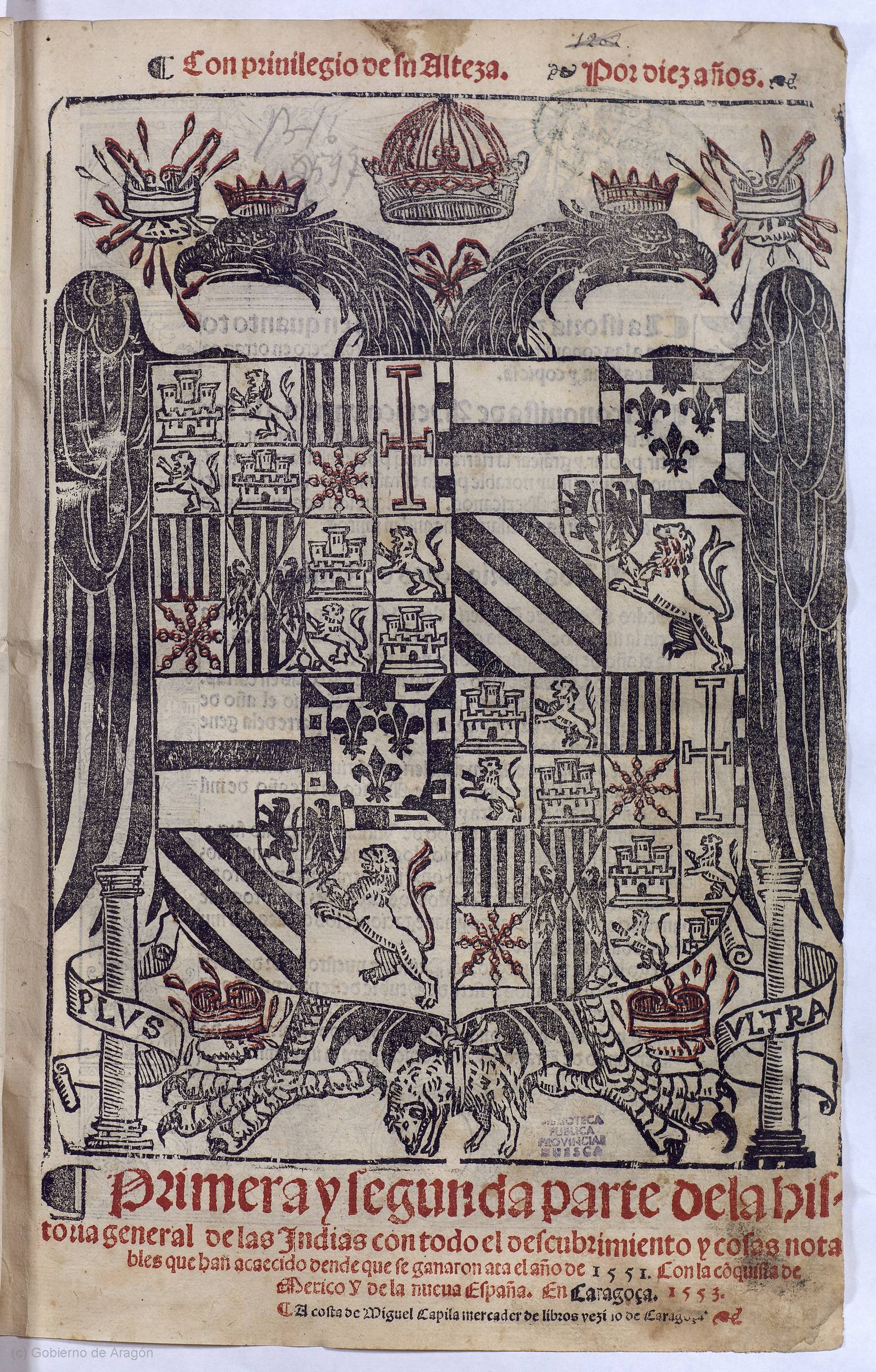 Portada de la edición impresa en Zaragoza en 1553 de la Historia general de las Indias de Francisco López de Gómara.